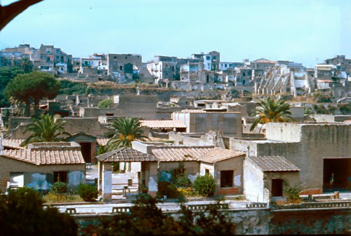 Opgravingen Herculaneum (eigen foto, 1981)